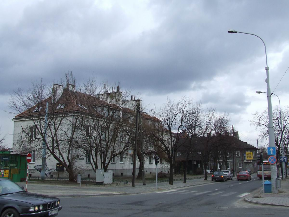 Piaseczno, ulice miasta, na chodniku słupy, kiedyś z trakcją trolejbusową